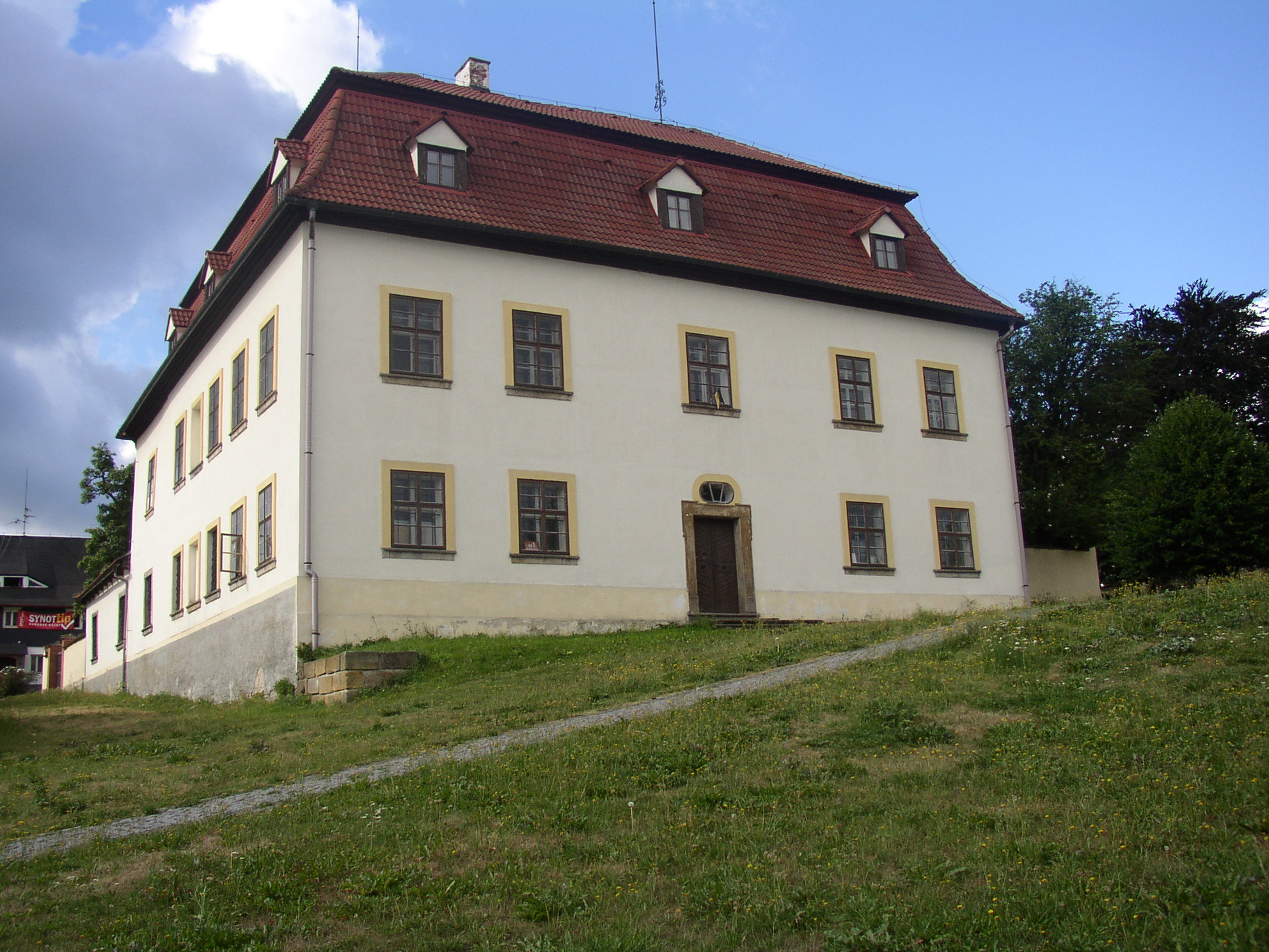 Budova fary v Jiřetíně pod Jedlovou, Česká republika